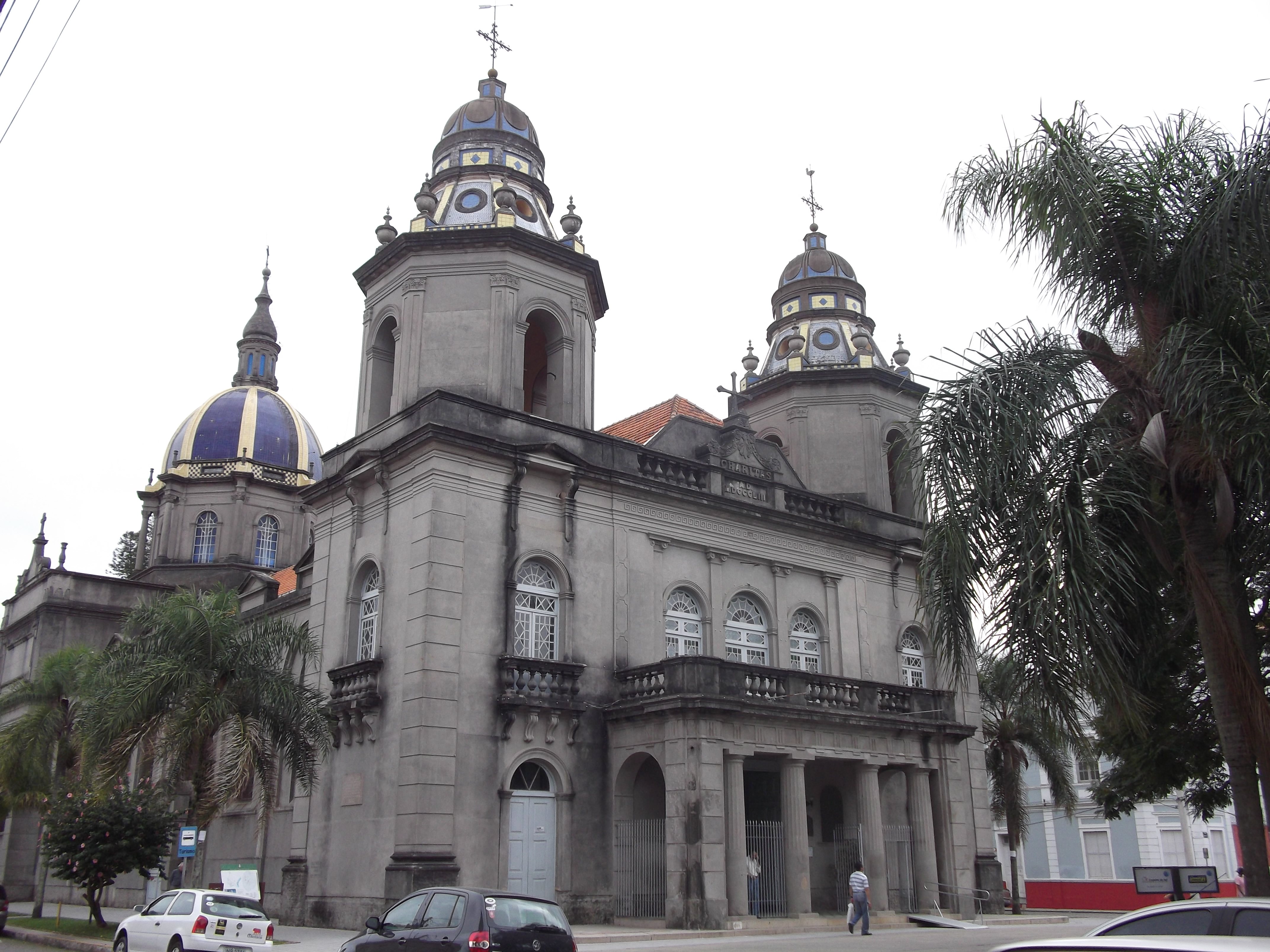 Catedral de Pelotas